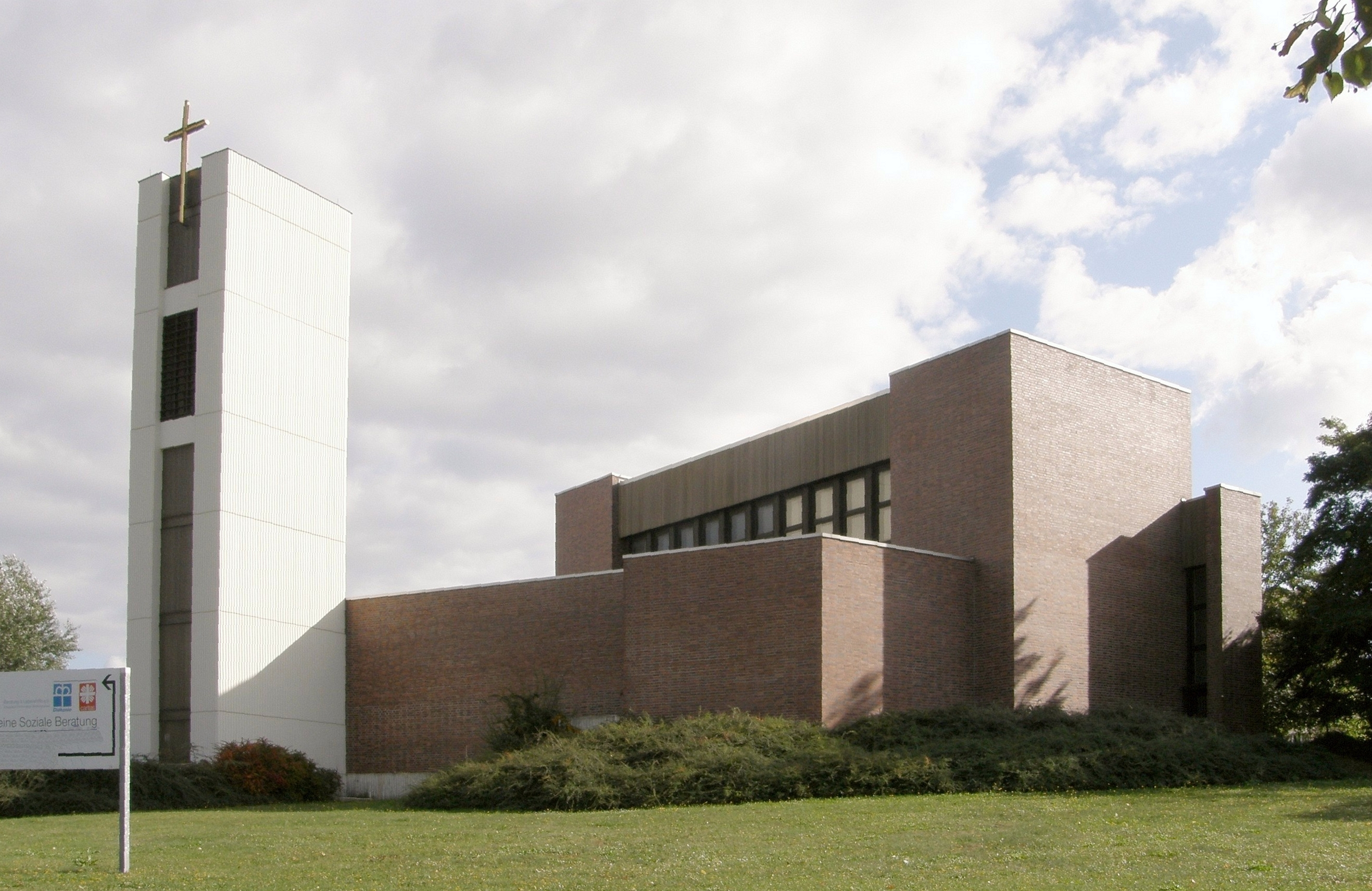 Kirche in Berlin-Marzahn, Außenansicht von der Landsberger Allee